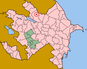 Map of Azerbaijan showing Shaki (Şəki) sahar.